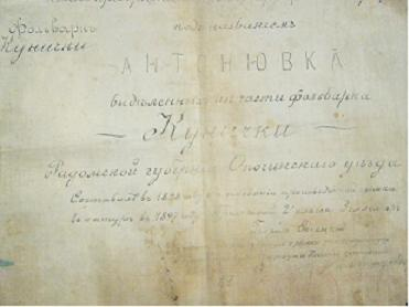 "Stopka" mapy płóciennej z 1898r. w języku rosyjskim z naniesionym napisem miejscowości Antoniówka